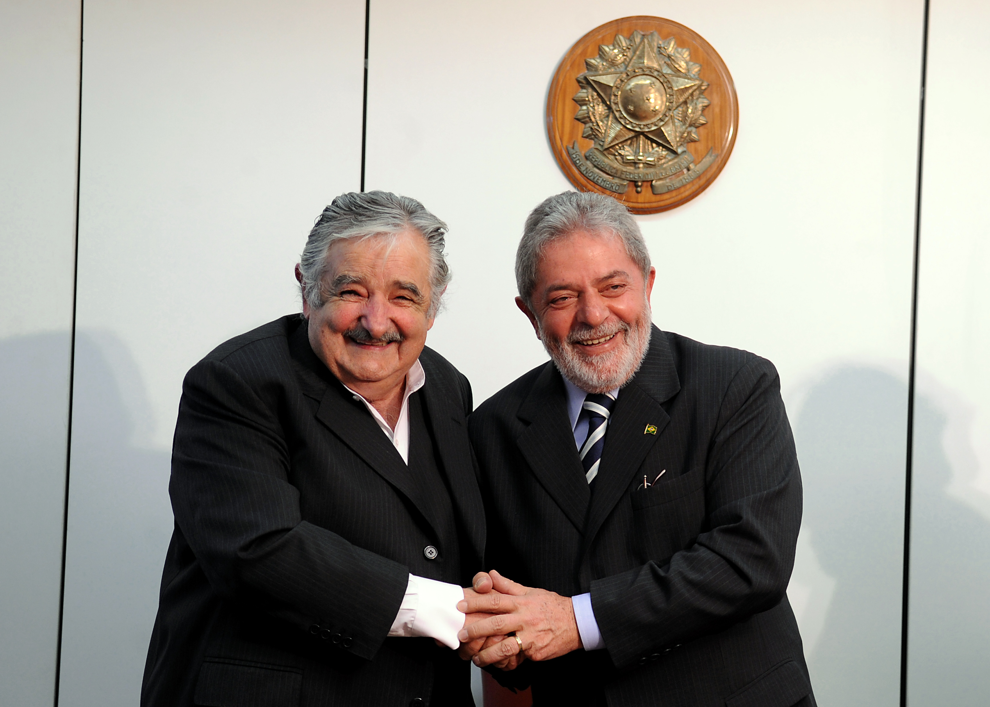 O presidente Luiz Inácio Lula da Silva recebe Jose Mujica, candidato à Presidência do Uruguai pela Frente Ampla